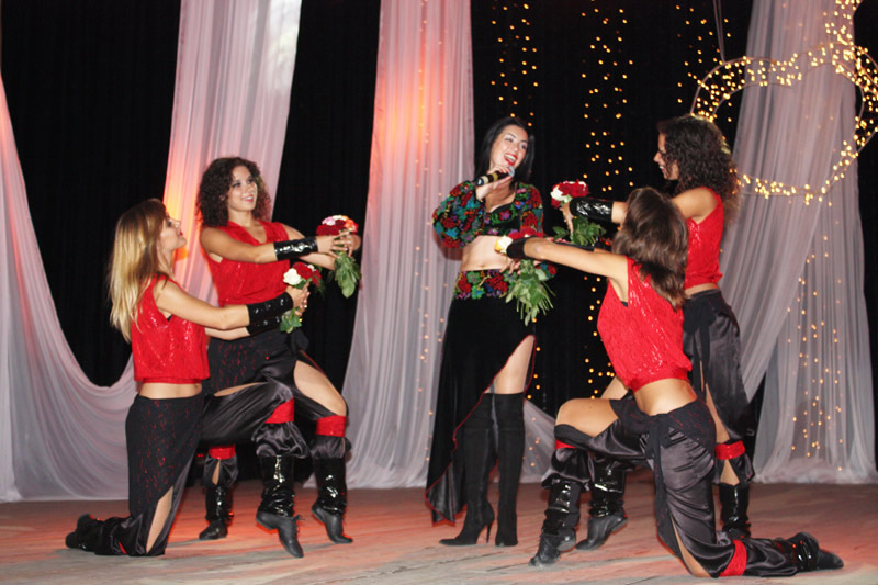 фото Зоряни Юдін під час виступу до дня Незалежності України 24.08.2009 у м. Львів